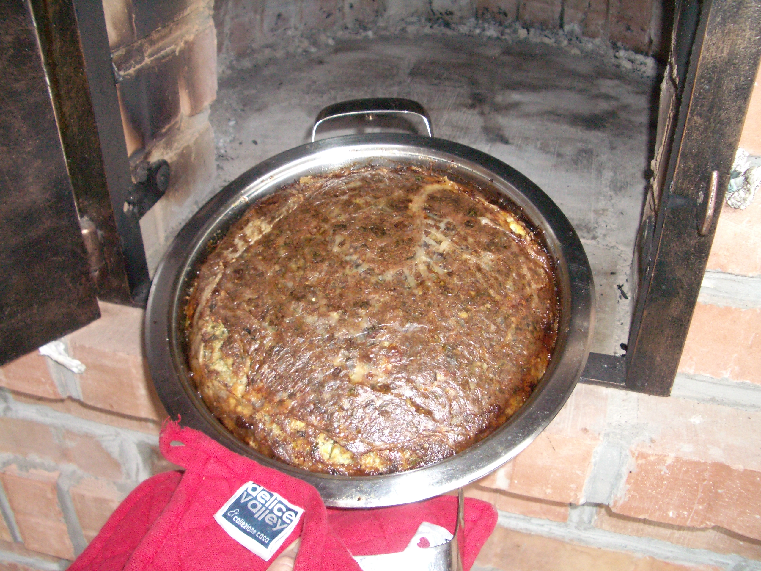 Drob de miel traditionale Sarulesti, Buzau